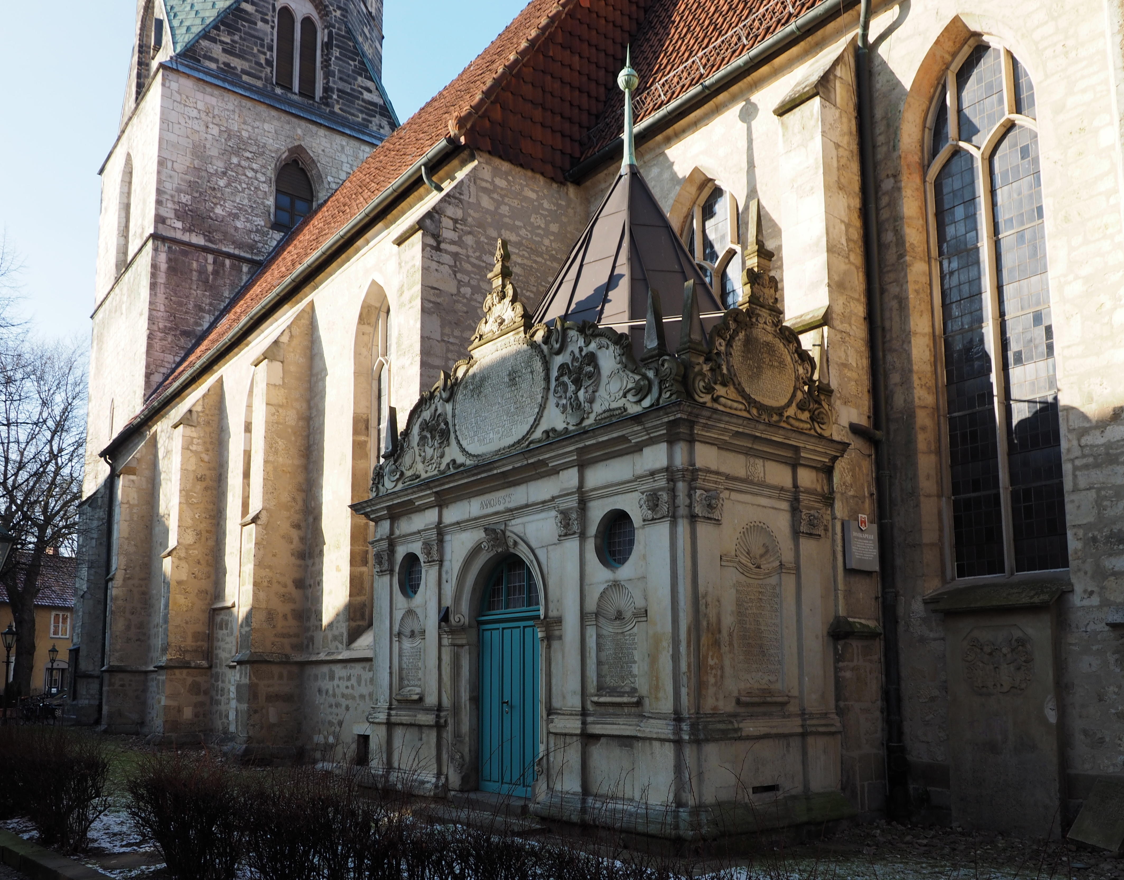 Schloss- und Stadtkirche St. Crucis (Hannover), mit Duve-Kapelle